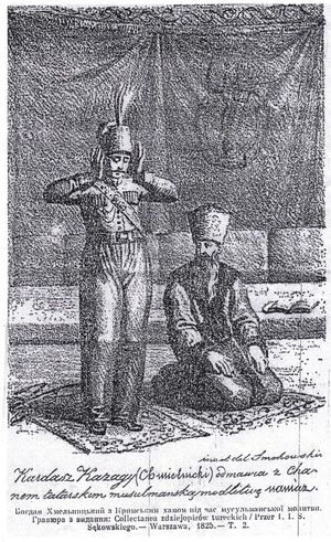 Богдан Хмельницкий с Крымским ханом совершает мусульманскую молитву